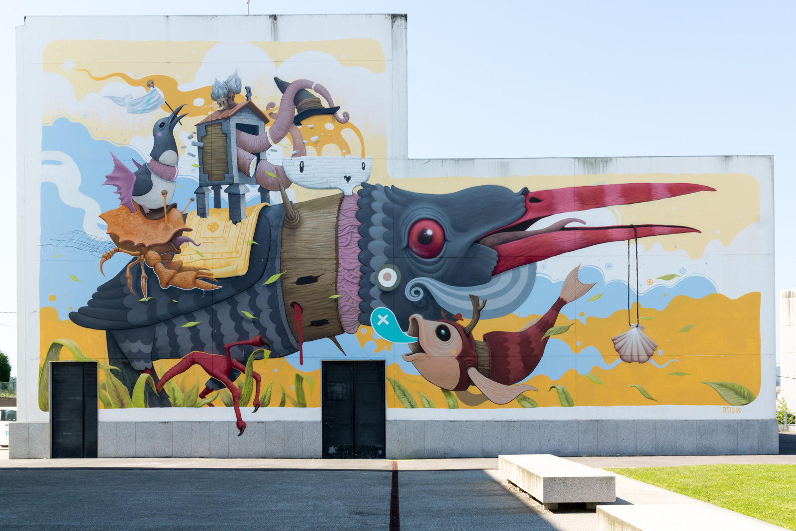 Rexenera - 110. Título: "Wildlife", autor: Dulk (2015); localización: Fórum Carballo